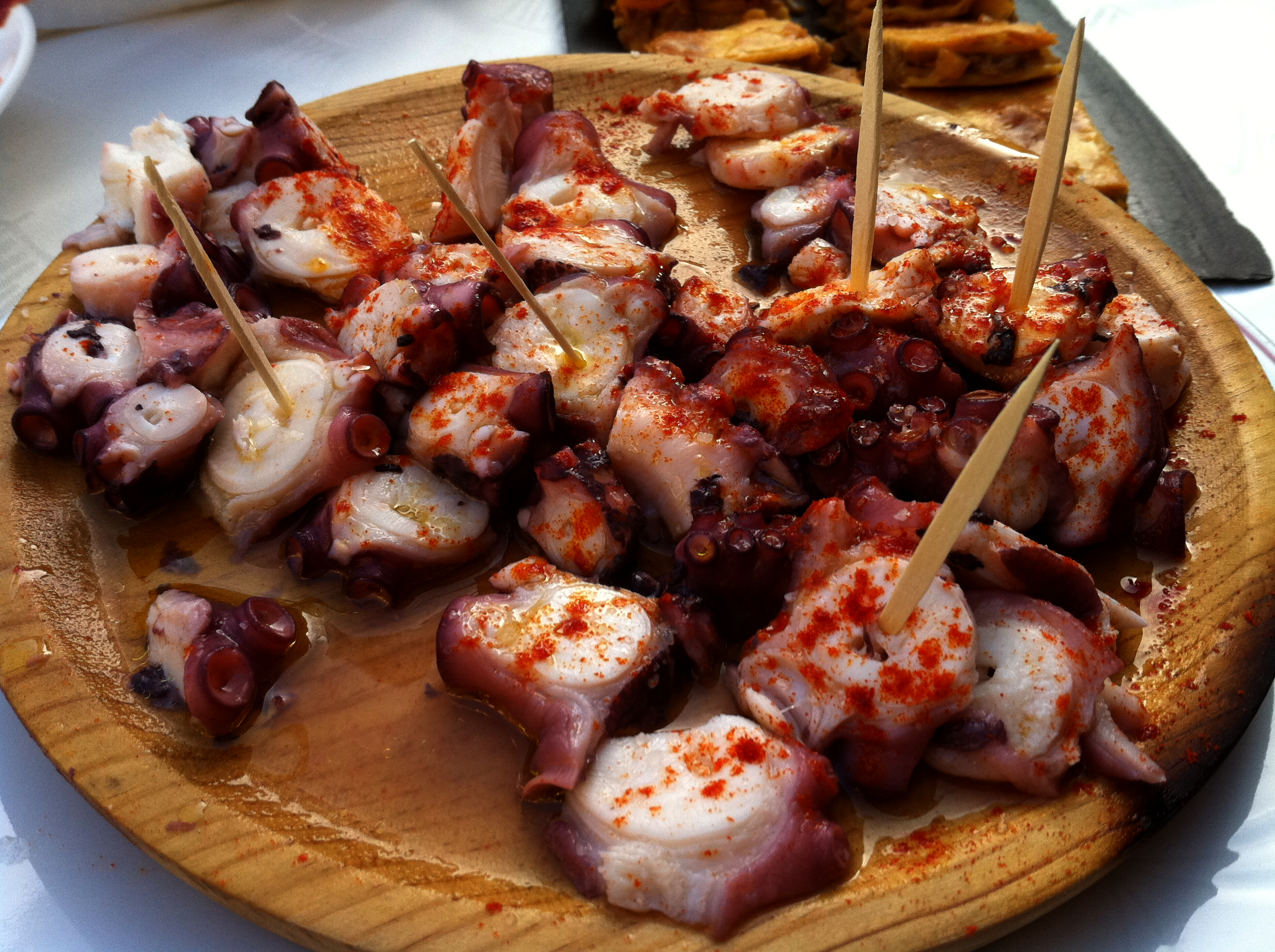 Prato típico da gastronomía galega.